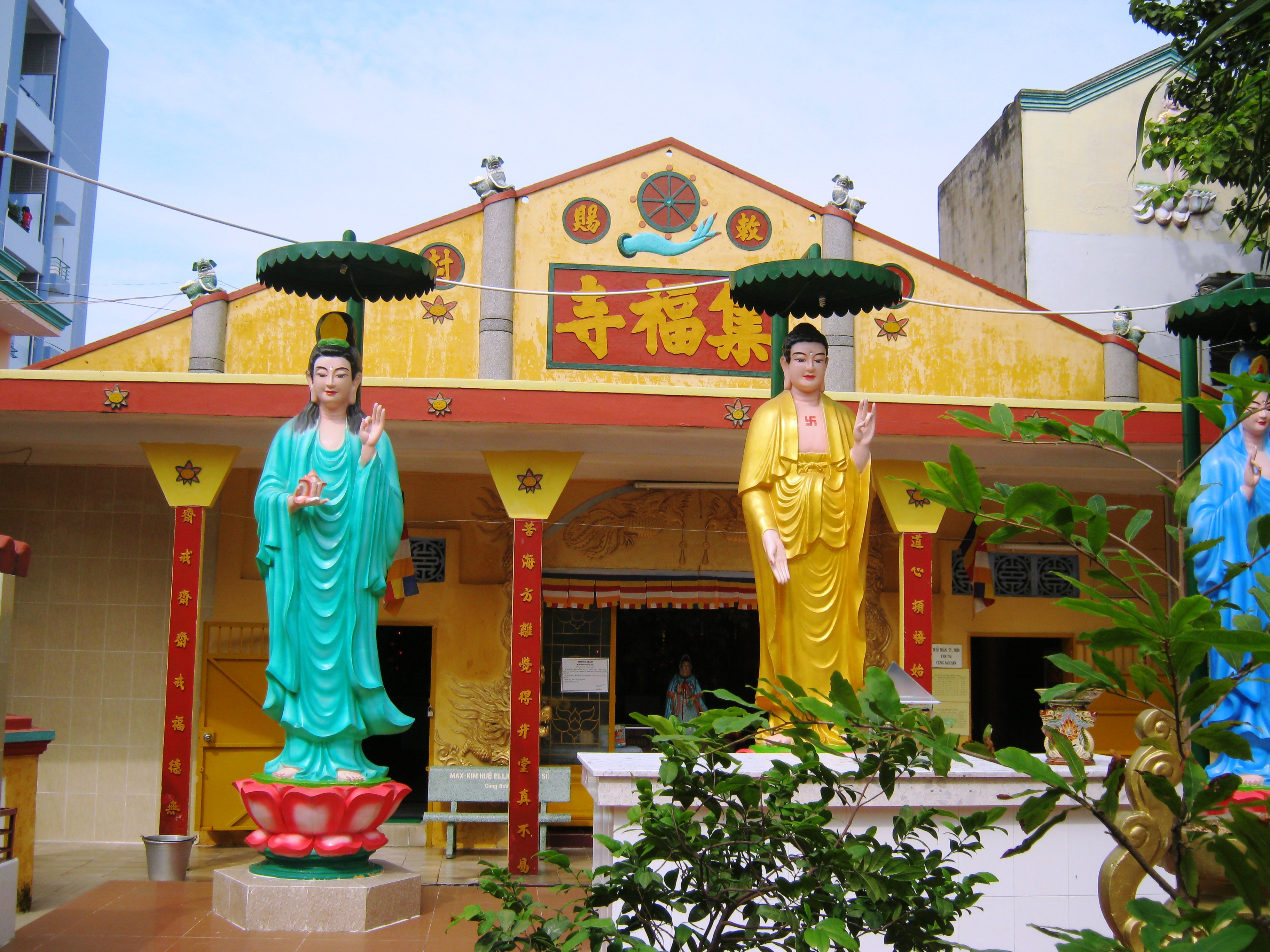 Chùa Tập Phước còn có tên là Sắc Tứ Tập Phước Tự (vì chùa được vua Gia Long sắc tứ năm 1802), hiện toạ lạc ở số 233 đường Phan Văn Trị, quận Bình Thạnh, Thành phố Hồ Chí Minh, Việt Nam.